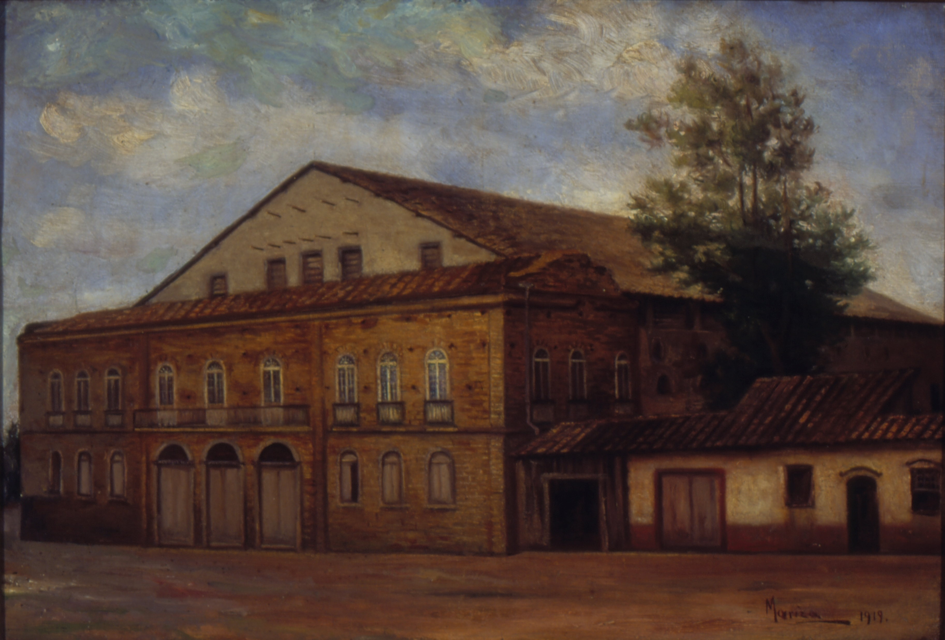 Obra que integra o acervo do Museu Paulista da USP. Coleção Fundo Museu Paulista.